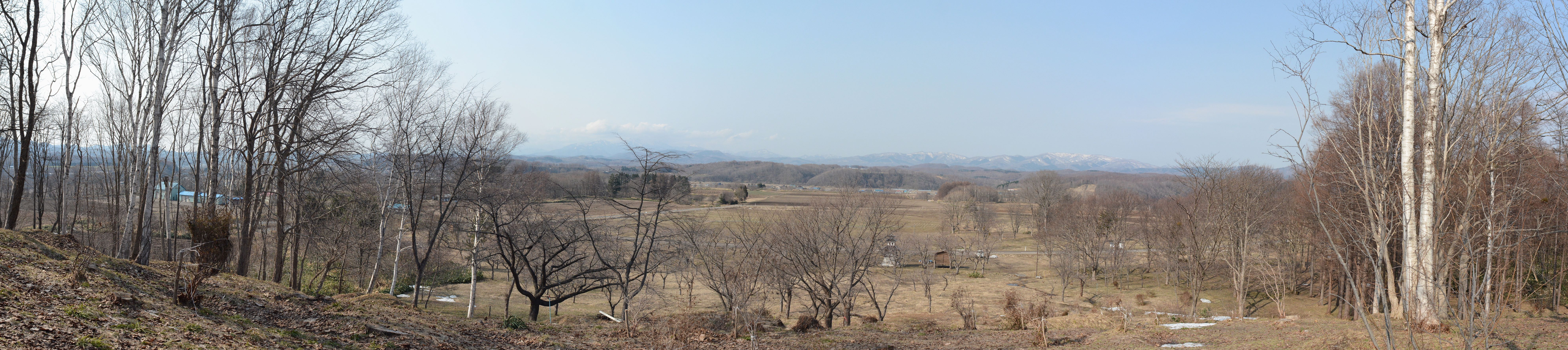 厚沢部町字城丘に所在する史跡館城跡の全景。館城南側に位置する通称「円山」から撮影。